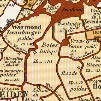 Boterhuispolder